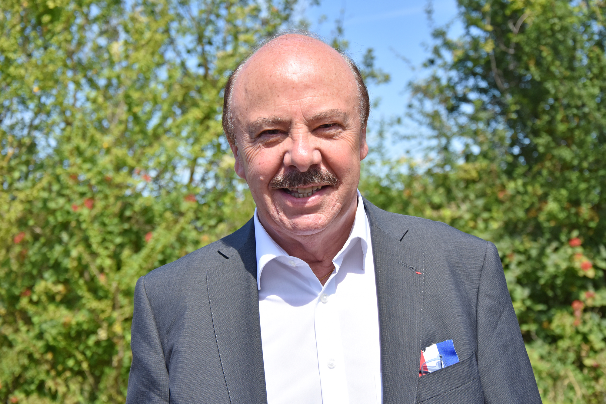 Alain Gest le 9 juillet 2019